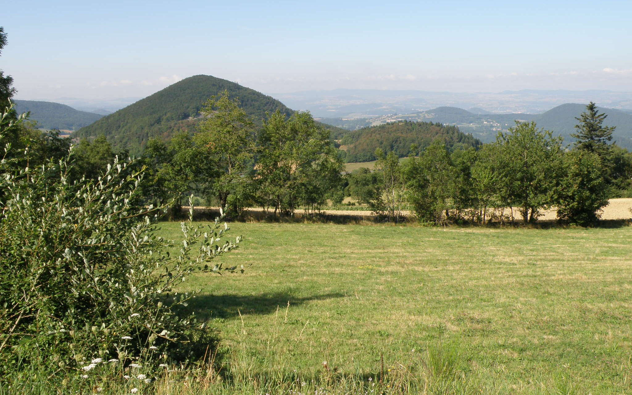 Saint-Hostien, comm. de la Haute-Loire, France. À gauche, le mont Pigier (ou mont Pidgier, graphie utilisée par l'IGN ; alt. 1074m), avec sa silhouette presque parfaitement conique, et dont on voit ici le flanc nord-est. Vue prise depuis la route départementale n° 28 (le Pertuis - Saint-Julien-Chapteuil), non loin du Pertuis.